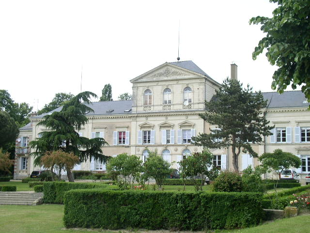 Chateau de Narcé